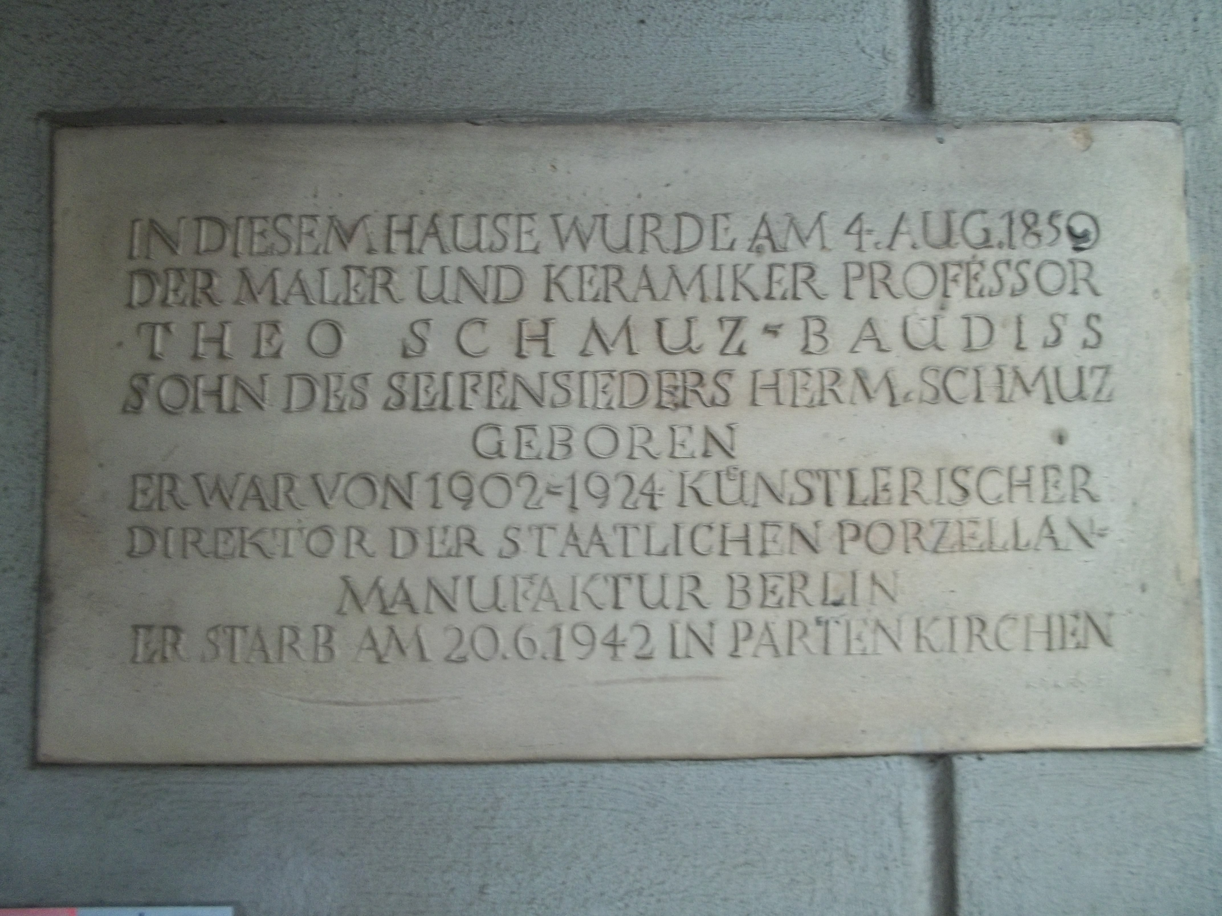 Gedenktafel in Herrnhut im Hauseingang des Hauses Löbauer Straße 15 - dort kam Theo Schmuz am 4. August 1859 als Sohn des Seifensieders Hermann Schmuz zur Welt.